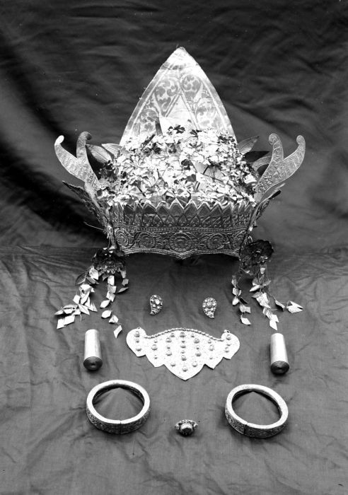 Negatief. Hoofdtooi en sieraden die deel uitmaken van een Balinees dansornaat